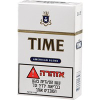 טיים סיגריה